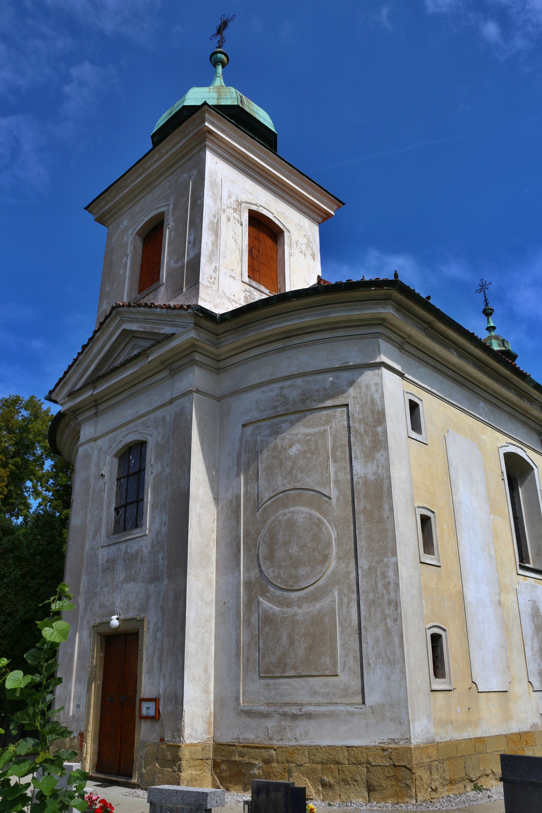 Benátky nad Jizerou-Staré Benátky, hřbitov a kostel